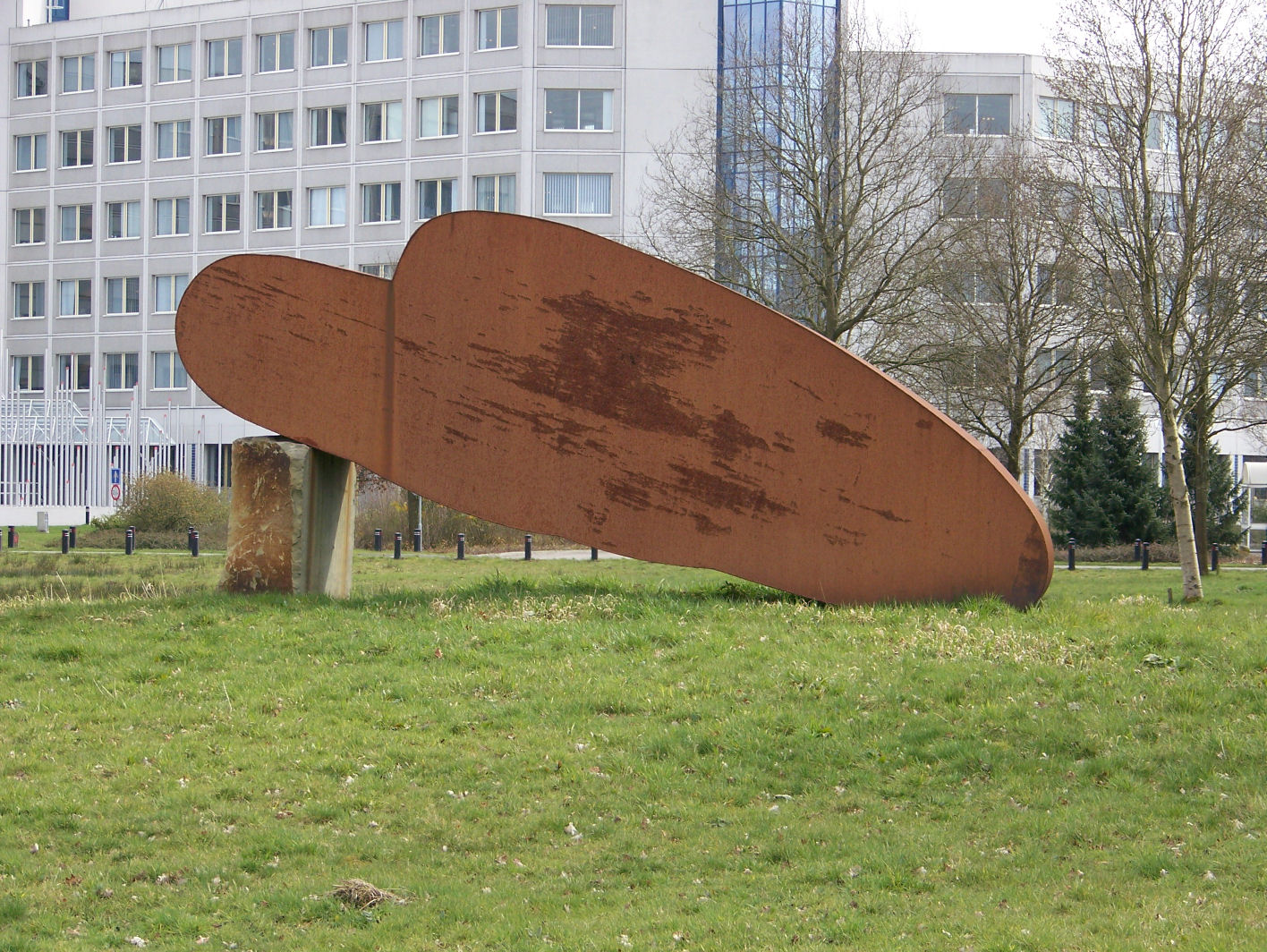 door Gjalt Blaauw, Europaweg Zuid in Assen